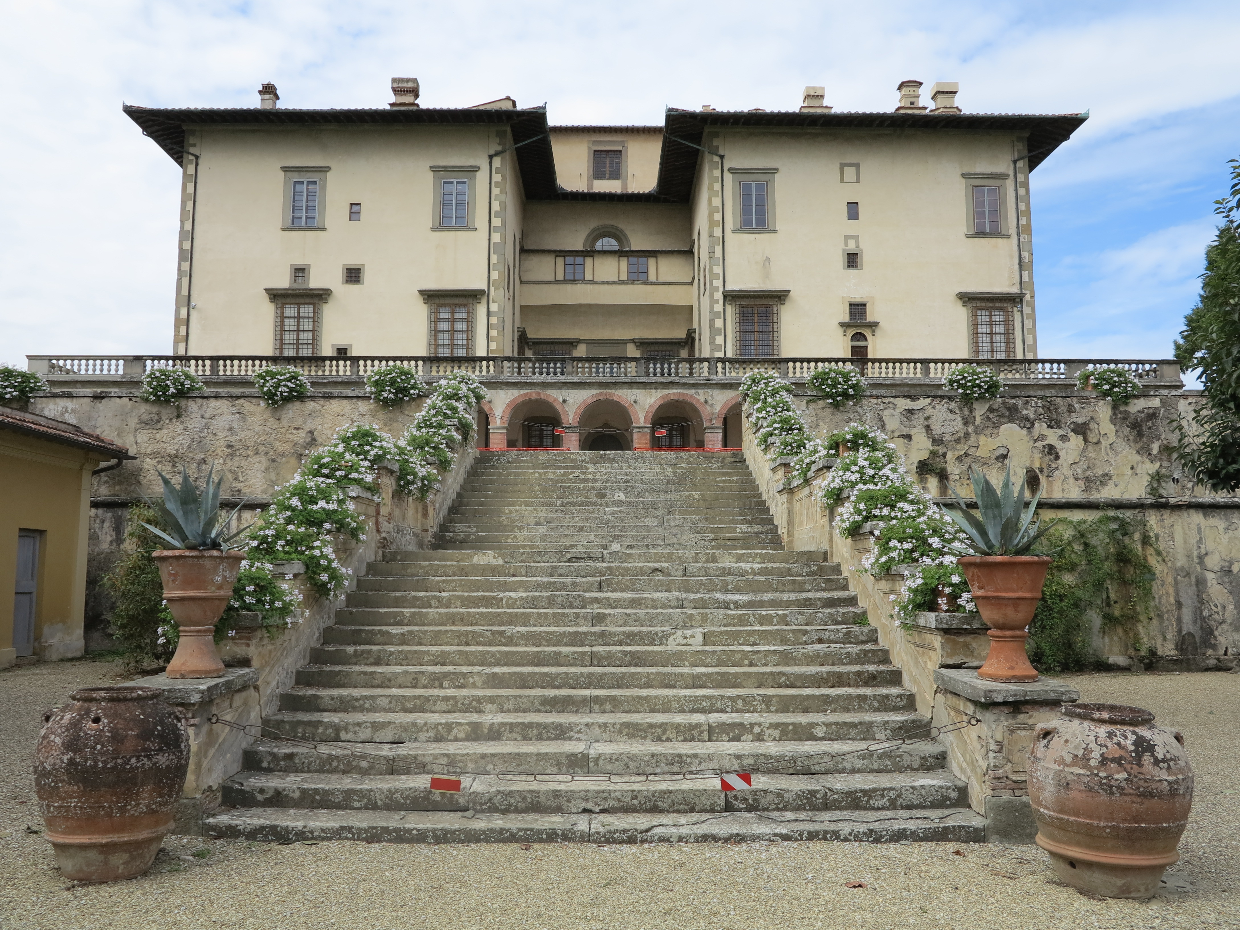 Villa medicea di Poggio a Caiano - MIBAC This is a photo of a monument which is part of cultural heritage of Italy.